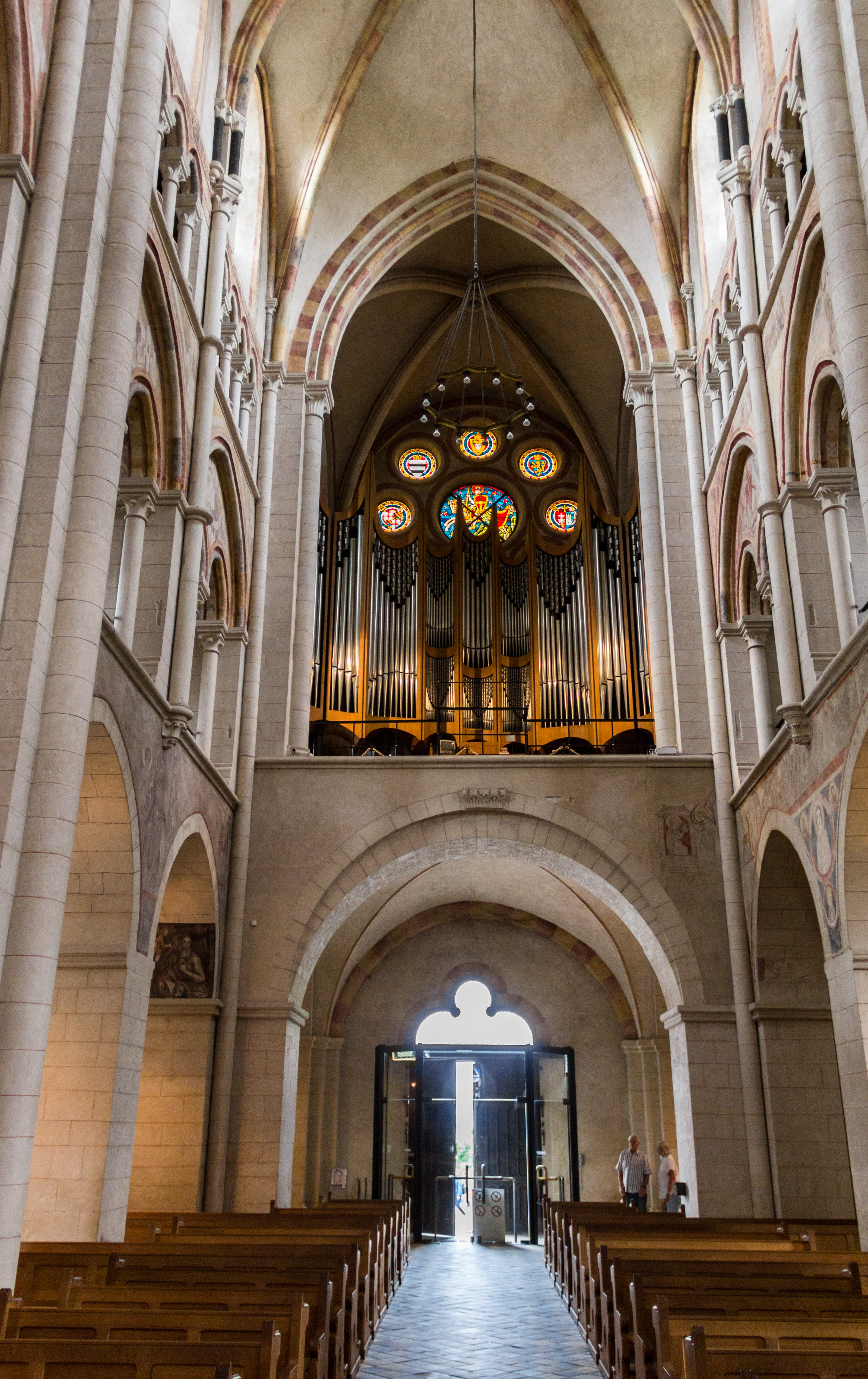 Limburg an der Lahn, Altstadt